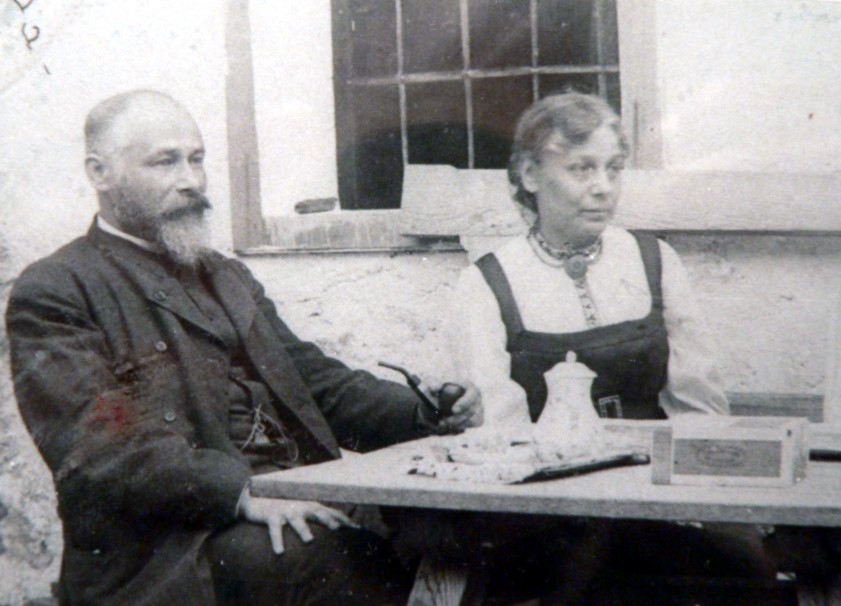 Adolf Exner und Schwester Marie von Frisch (geb.Exner) Foto im Eigenbesitz, aufgenommen ca. 1893, älter als 100 Jahre, (Ausschnitt. Ursprünglich drei Person auf Foto, eigene Urgrossmutter (Gisa Conrad) abgeschnitten) Fotograf Urgrossonkel Erich Conrad. Starb in den zwanziger Jahren des 20. Jahrhunderts an Kinderlähmung. Mir ist niemand bekannt, der das Foto ansonsten besitzt. Darstellung: Adolf Exner und Marie Exner am Tisch sitzend, im Salzkammergut (?) Wien (?)